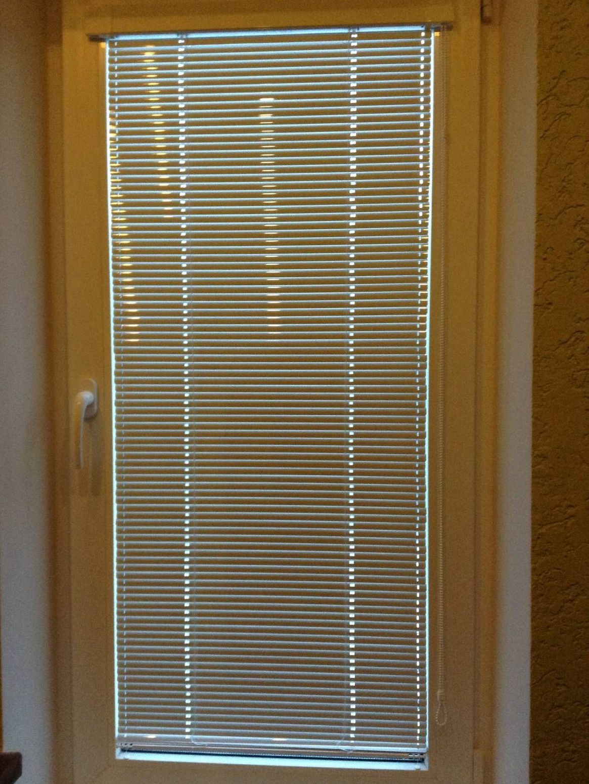 Горизонтальные жалюзи можно использовать не только для окон, но и для дверей.